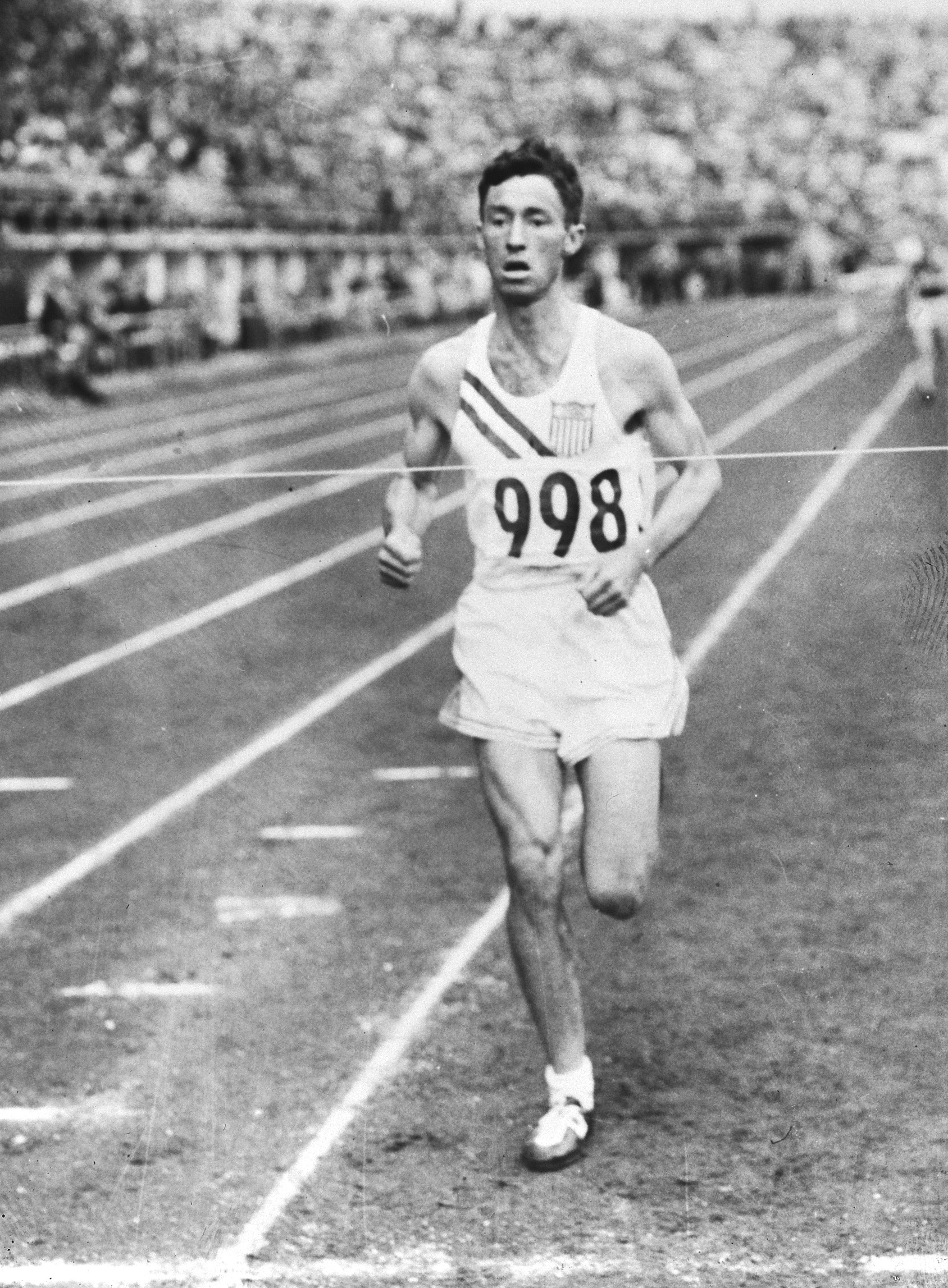 Collectie / Archief : Fotocollectie Anefo Reportage / Serie : [ onbekend ] Beschrijving : Ashenfelten USA 3000m Steeple Chase Datum : 28 juli 1952 Trefwoorden : Steeple, atletiek Fotograaf : Fotograaf Onbekend / Anefo Auteursrechthebbende : Nationaal Archief Materiaalsoort : Glasnegatief Nummer archiefinventaris : bekijk toegang 2.24.01.09 Bestanddeelnummer : 905-2434